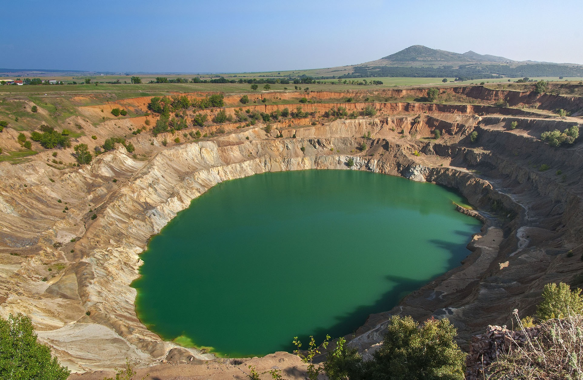 Рудник Цар Асен е разположен в близост до Пазарджик. В миналото в този район е бил много разпространен добивът на цветни метали, поради което има останали доста кратери на бивши рудници. Такъв е и този до село Цар Асен, който е служил за добив предимно на мед и други окисни руди.